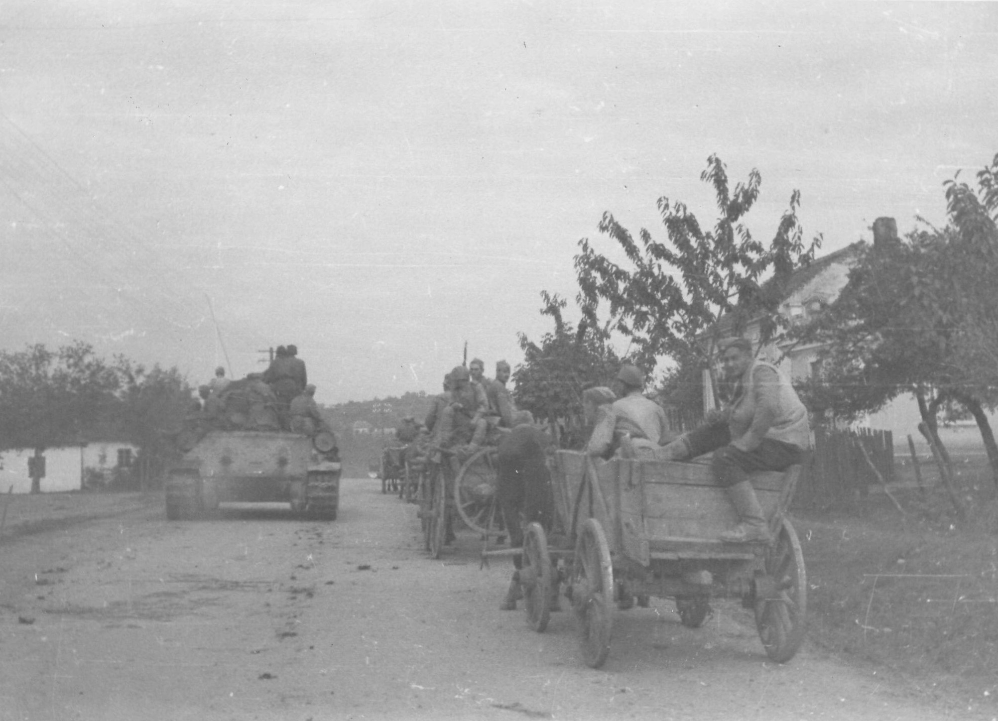 Srpskohrvatski / српскохрватски: Sovjetski tenk i komora kod Avale, na drumu ka Beogradu oktobra 1944.